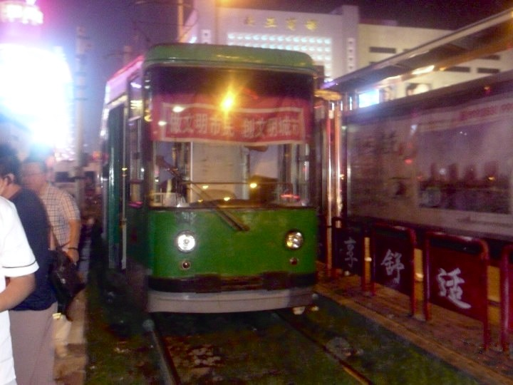 自己的作品